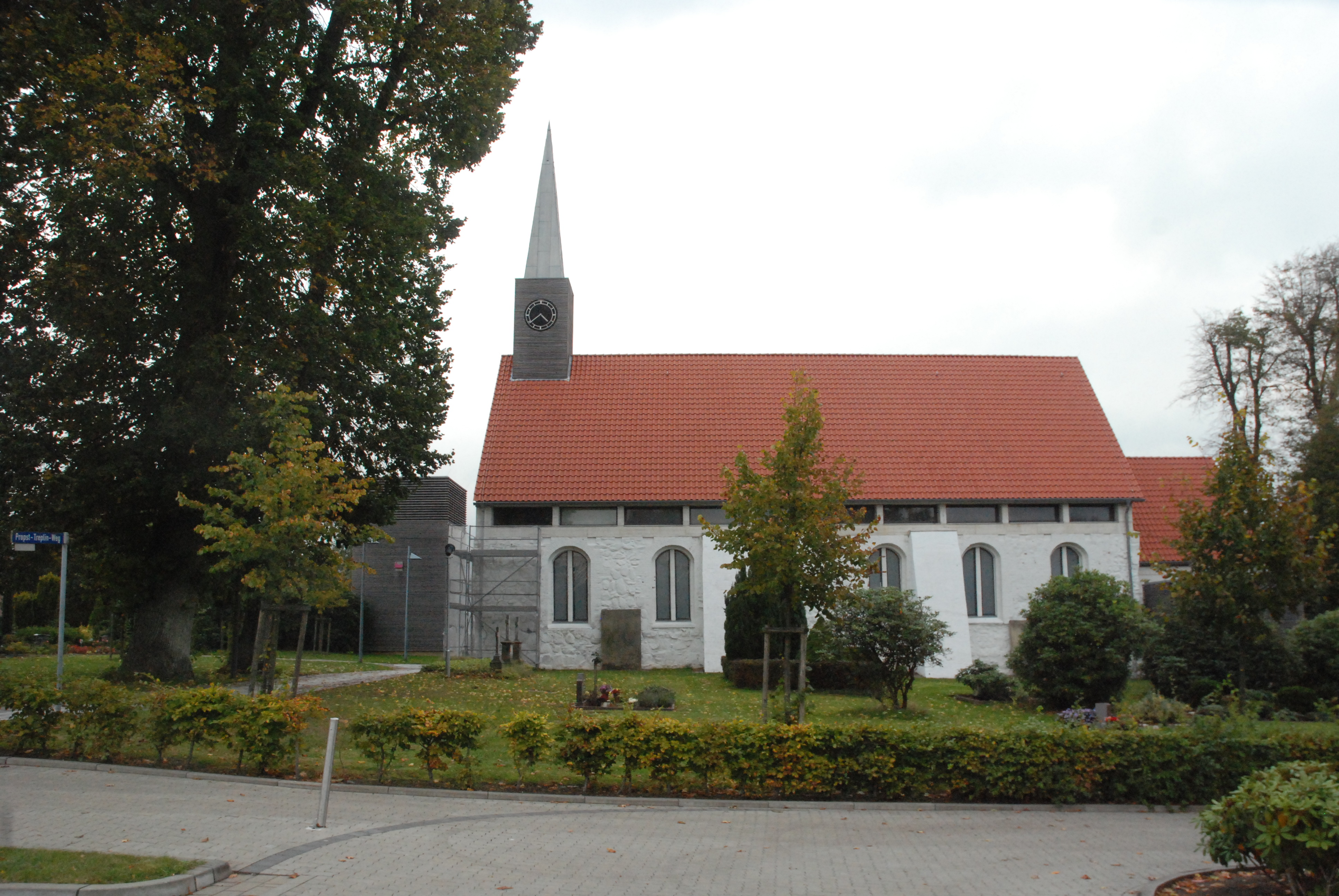 St. Severinkirche